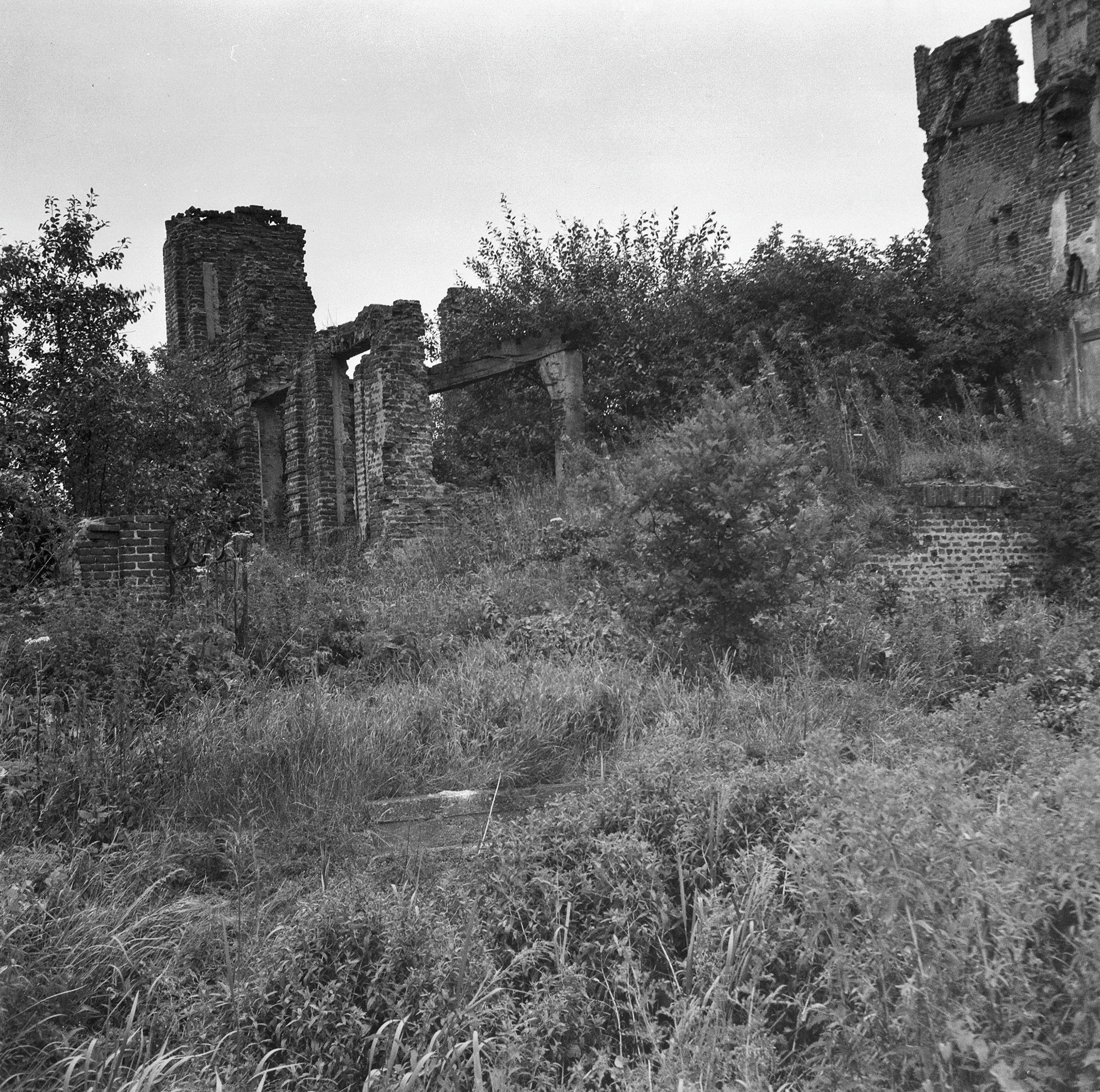 Kasteel: exterieur